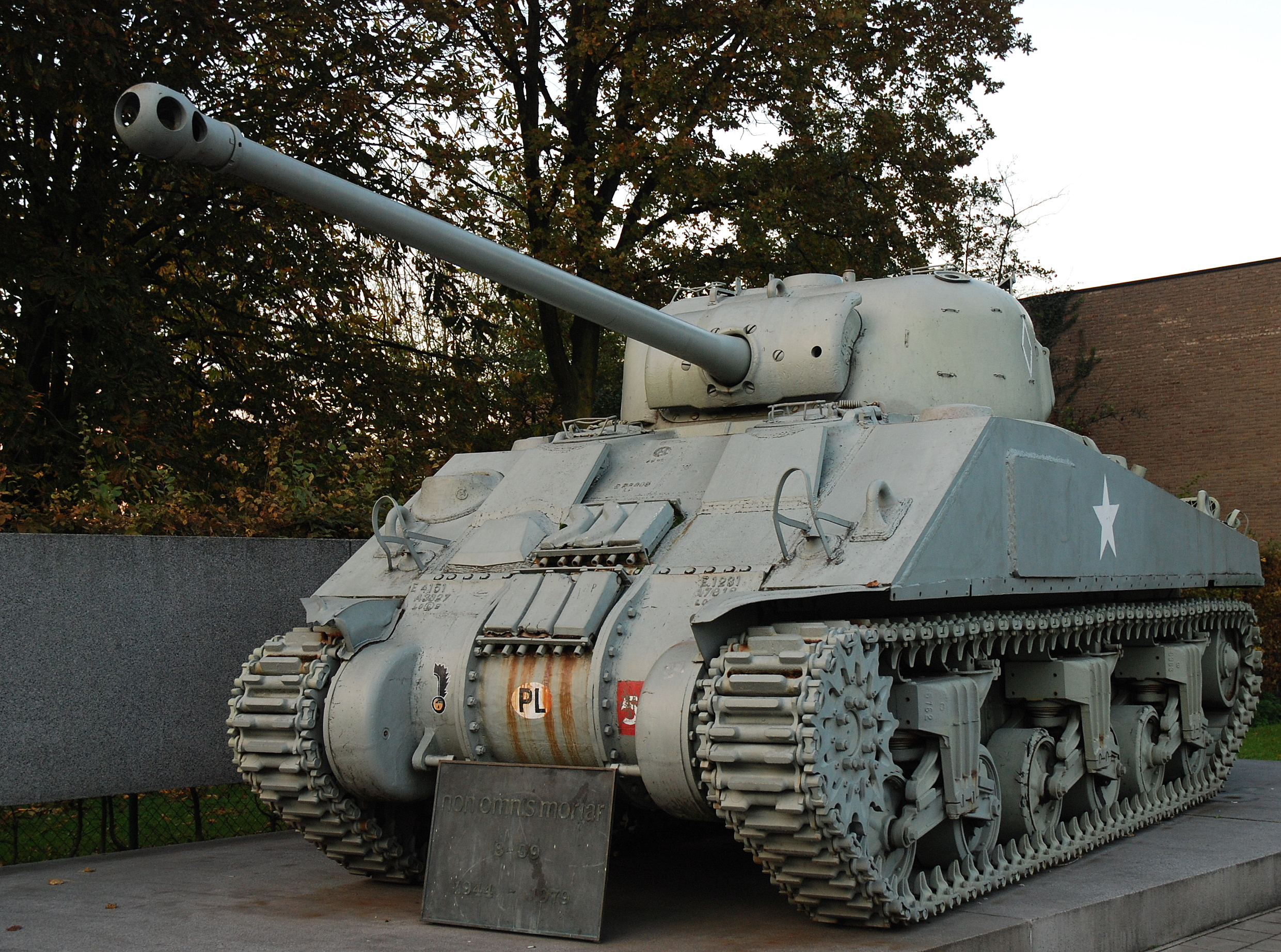 Gedenkteken voor de Polen met Shermantank die Tielt bevrijdden in sept 1944